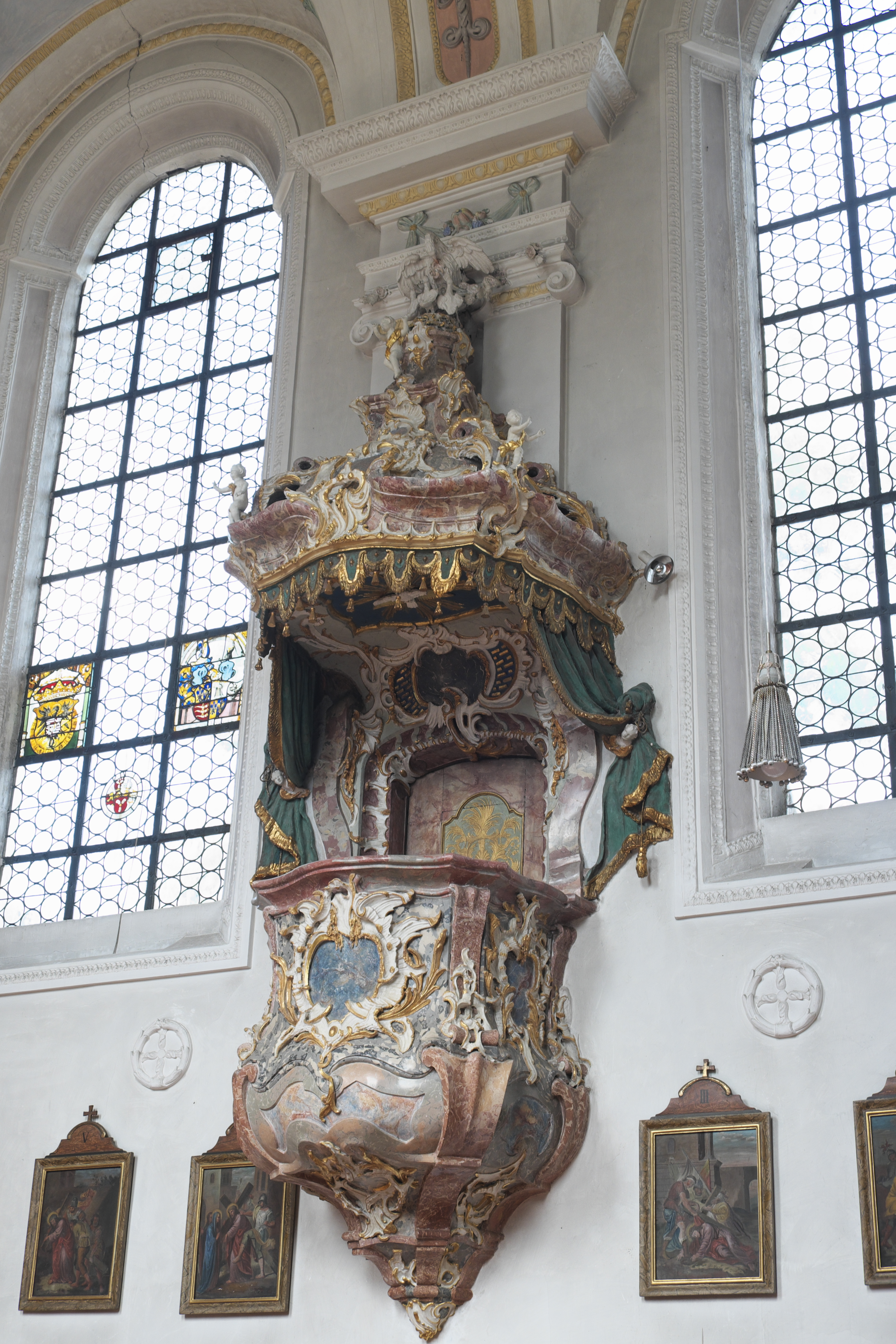 Katholische Pfarrkirche St. Wolfgang in Mickhausen im schwäbischen Landkreis Augsburg (Bayern/Deutschland), Kanzel aus Stuckmarmor von Jakob Jehle, von 1756